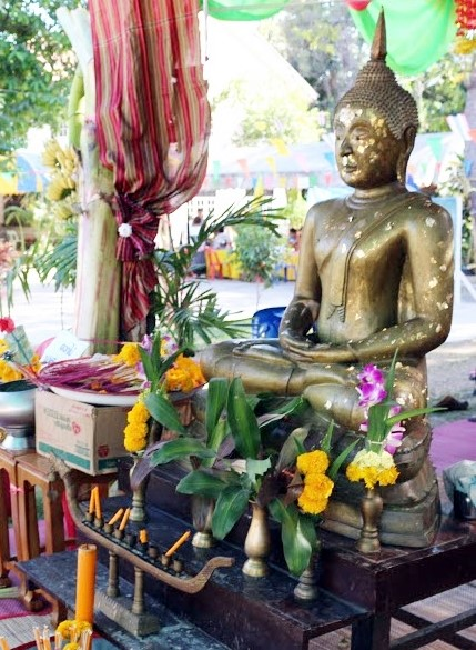 praputtharooppangsamathi1